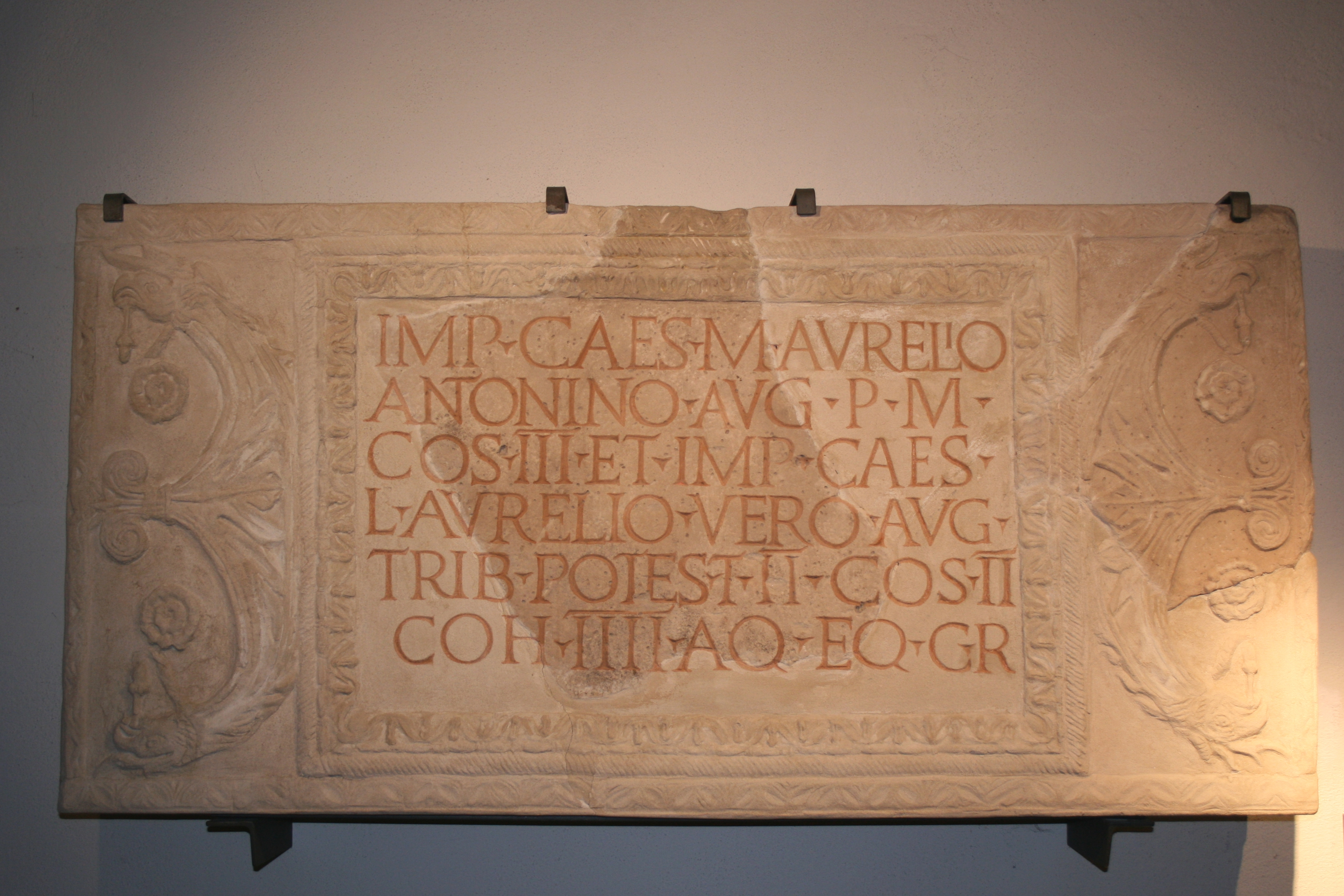 Kastell Obernburg, Bauinschrift von der principia 162 n. Chr. Ausgestellt im Römermuseum Obernburg am Main. Mit freundlicher Genehmigung des Museums und des 1. Bürgermeisters Walter Berninger. Lit.: Finke 00201 = RSO 00069 = CSIR-D-02-13, 00201 = AE 1923, 00030 (